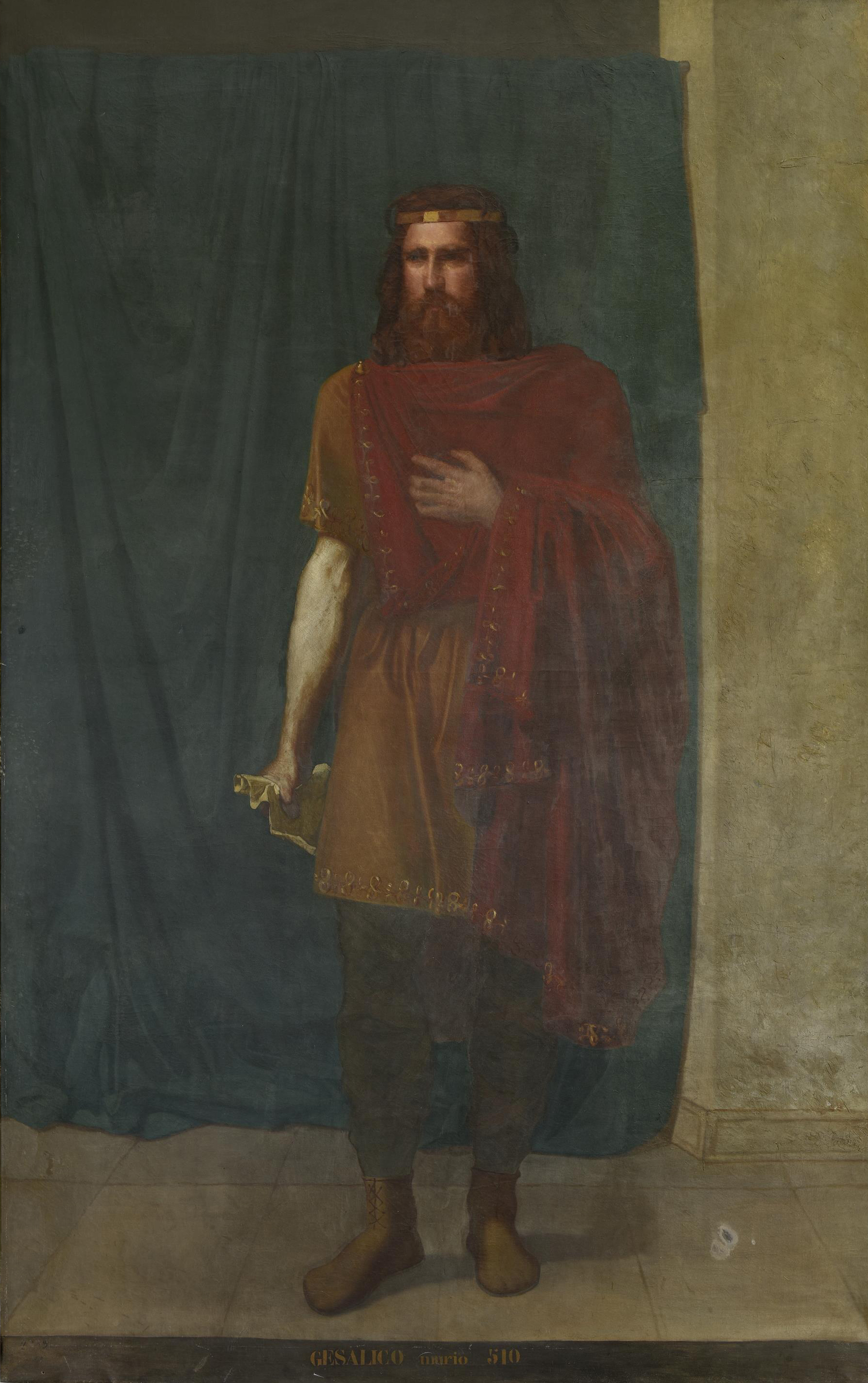 Retrato imaginario de Gesaleico († 511), rey de los Visigodos entre los años 507 y 511 e hijo ilegítimo y sucesor del rey Alarico II, a quien sucedió en el trono.